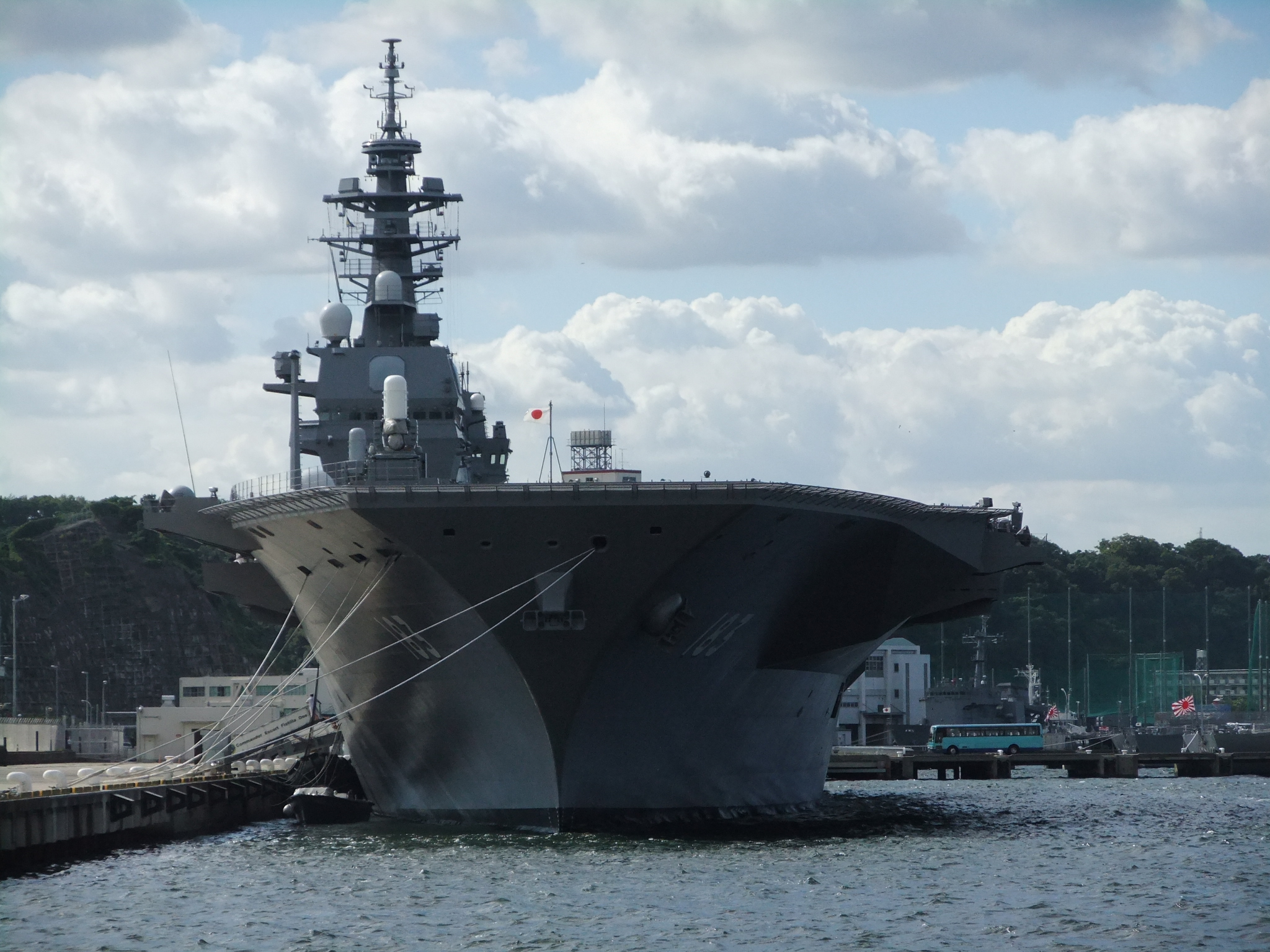 護衛艦いずも 正面から写す。